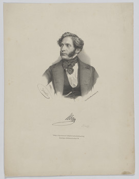 Porträt des Politikers Bruno Abegg.